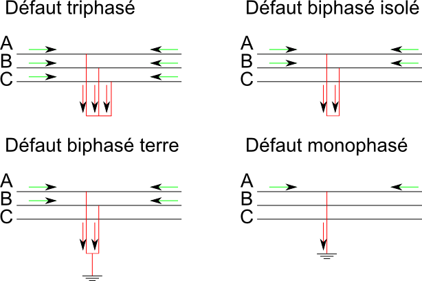 Différents types de court-circuit pour un système triphasé.